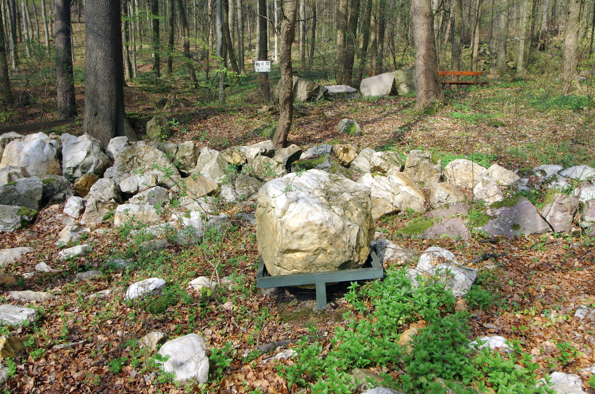 Mariánské Lázně Geopark zastavení č. 7 křemenná žilovina